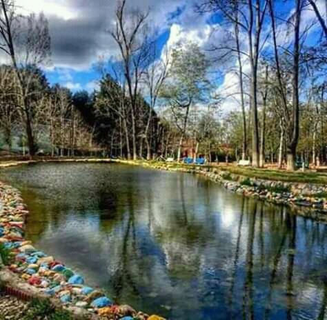 منتزه تاغبالوت بمدينة القصيبة إقليم بني ملال المغرب This is an image with the theme "Africa on the Move or Transport" from: Morocco